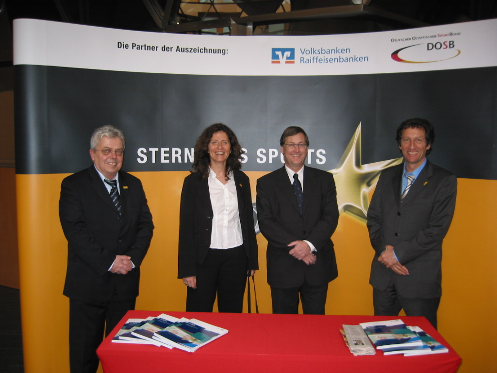 Auszeichnung Sterne des Sports